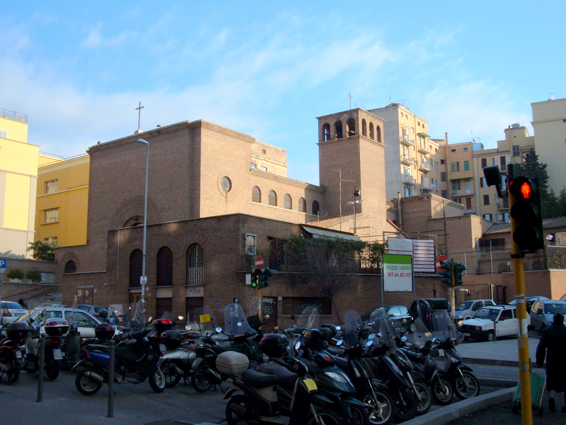 Chiesa di Sant'Ippolito, a Roma, nel quartiere Nomentano.